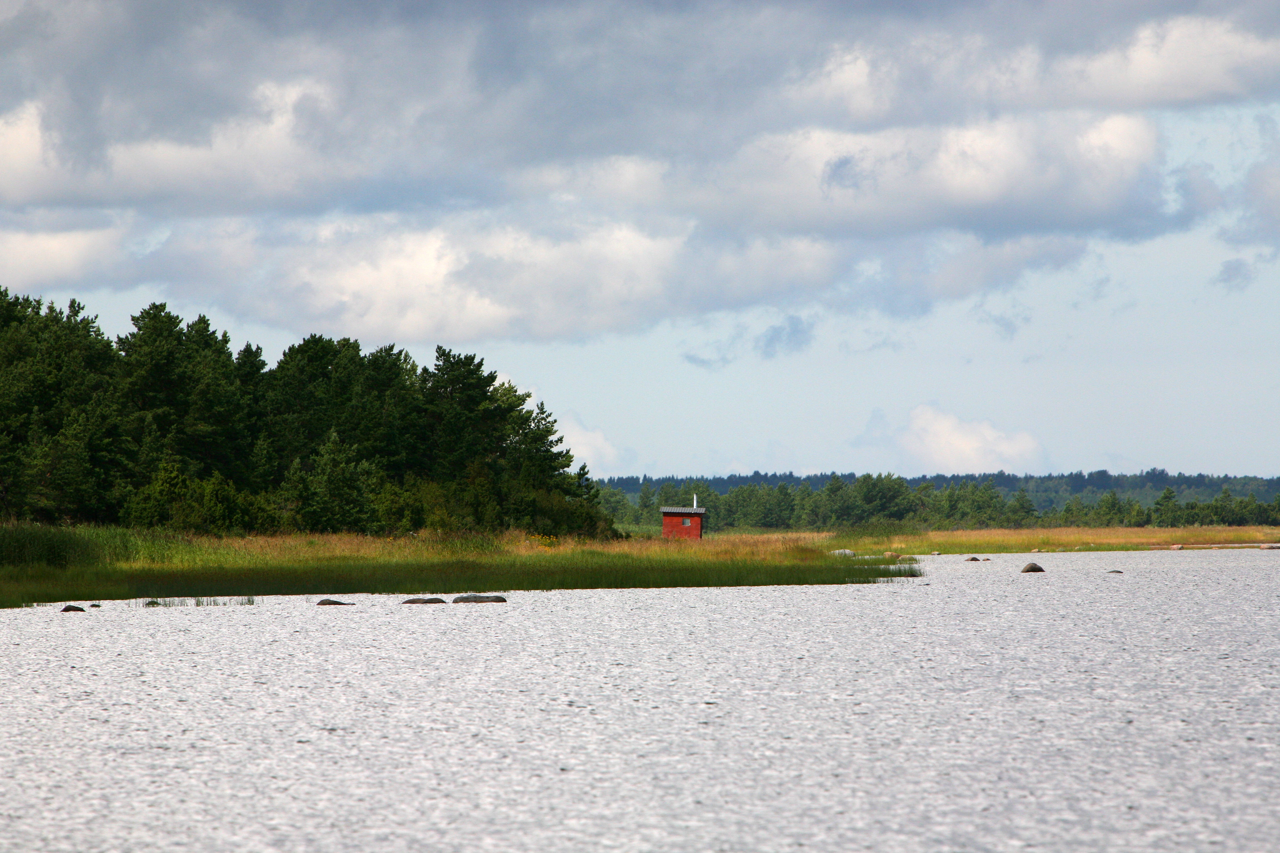 Väike saun Vohilaiul.